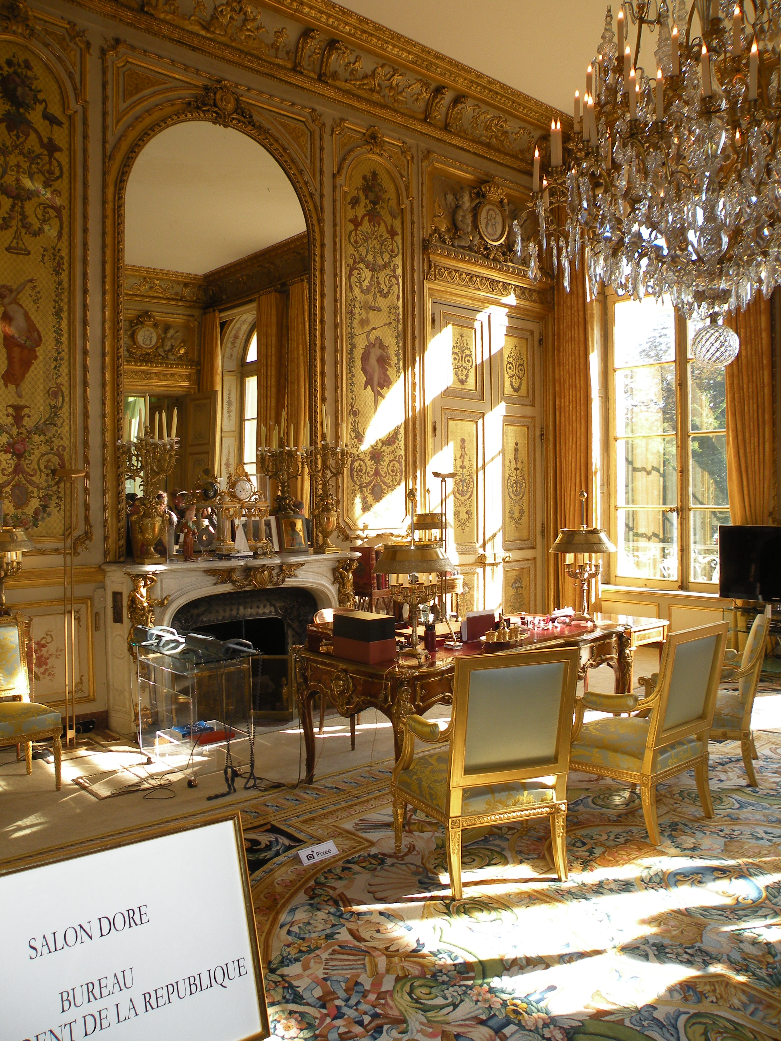 Salon Doré - Palais de l'Élysée